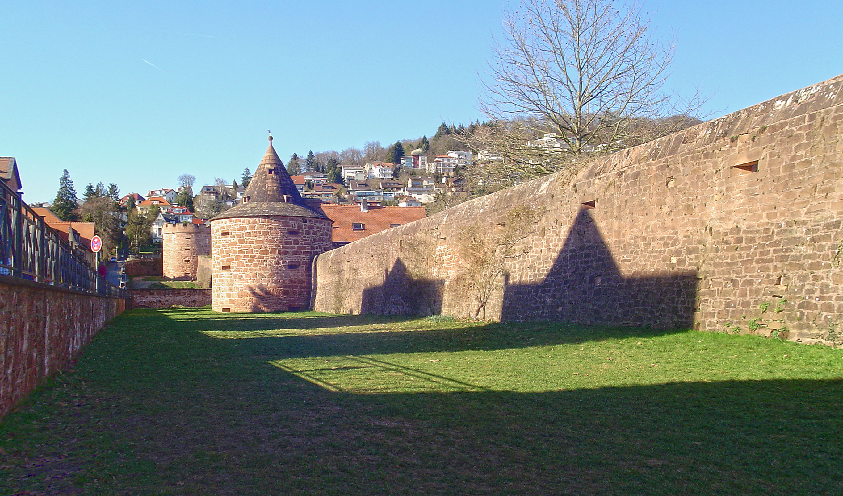 Stadtmauer in Büdingen im Wetteraukreis